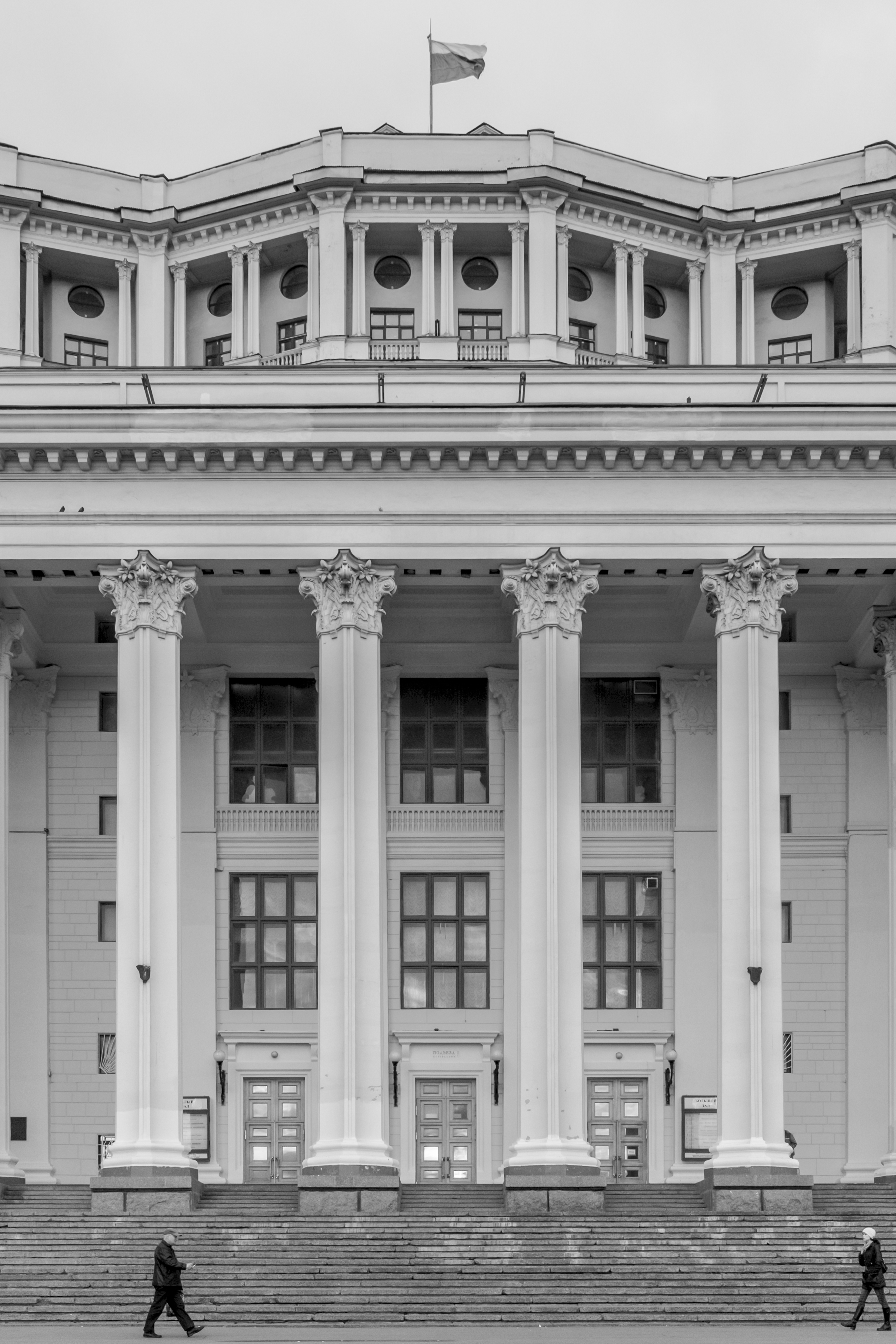 Центральный академический театр Российской армии (до 1951 года — Центральный театр Красной армии, с 1951 по 1993 — Центральный театр Советской армии), архитекторы К.С. Алабян, В.Н. Симбирцев, 1934-1940 гг. Central Academic Theatre of the Russian Army (1940-1951: The Central House of the Red Army, 1951-1993: Central House of the Soviet Army), architects K.S.Alabyan, V.N.Simbirtsev, b.1934-1940.